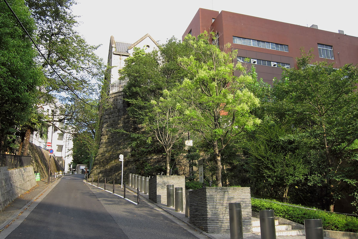 東京都千代田区永田町の新坂（遅刻坂）。高台の右側が都立日比谷高校、左側がメキシコ大使館。